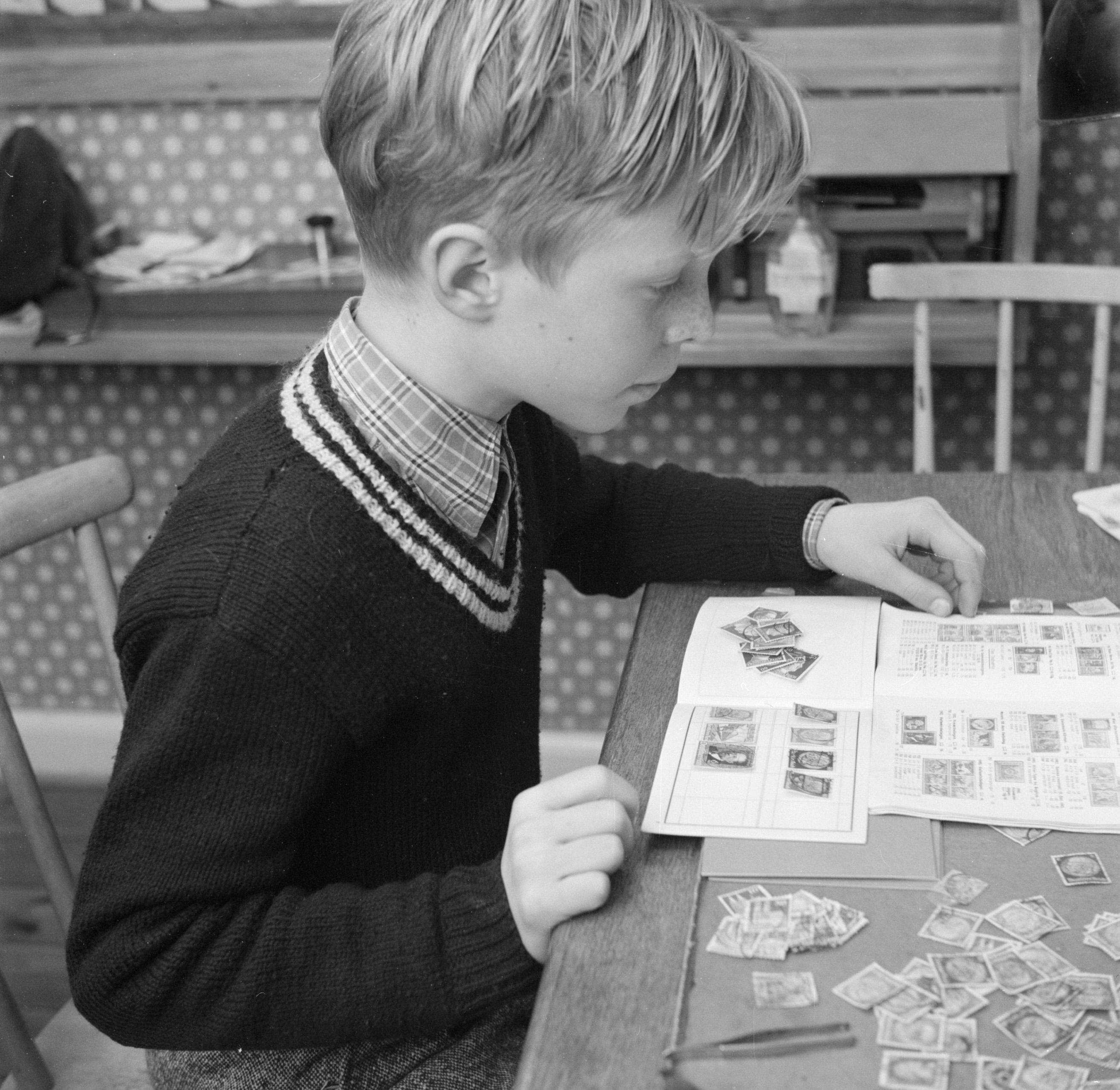 Collectie / Archief : Fotocollectie Van de Poll Reportage / Serie : Dag uit het leven van de familie Svendsen Beschrijving : Jongen bezig met een postzegelverzameling Datum : maart 1954 Locatie : Denemarken Trefwoorden : dagelijks leven, filatelie, huiselijkheid, huisraad, interieurs, jongens, kinderen, meubilair, postzegels, tafels, thuis, verzamelingen, vrijetijdsbesteding Persoonsnaam : Svendsen, [...] Fotograaf : Poll, Willem van de, [onbekend] Auteursrechthebbende : Nationaal Archief Materiaalsoort : Negatief (zwart/wit) Nummer archiefinventaris : bekijk toegang 2.24.14.02 Bestanddeelnummer : 252-8770